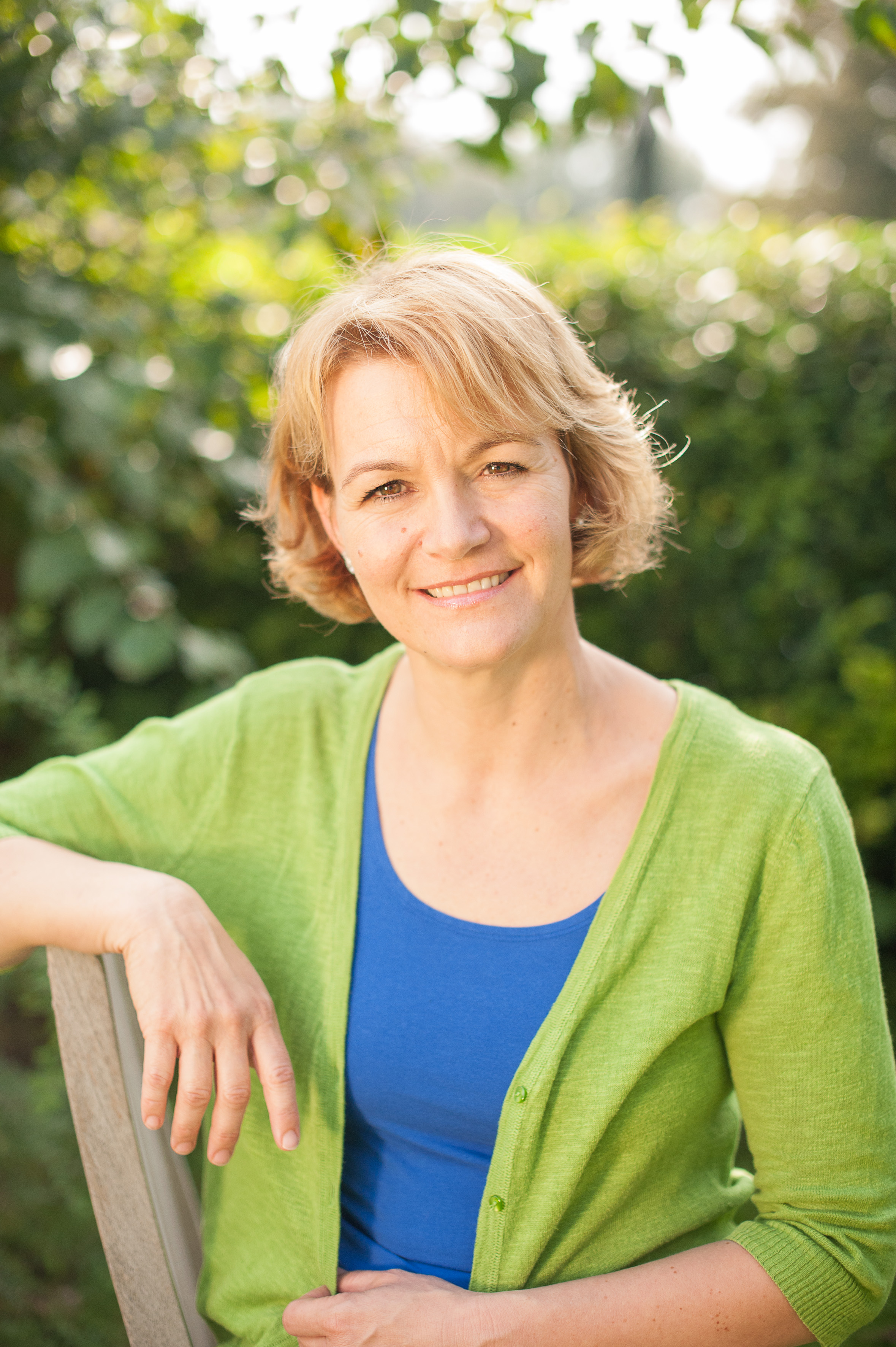 LAbg. Amrita Enzinger MSc. 2014